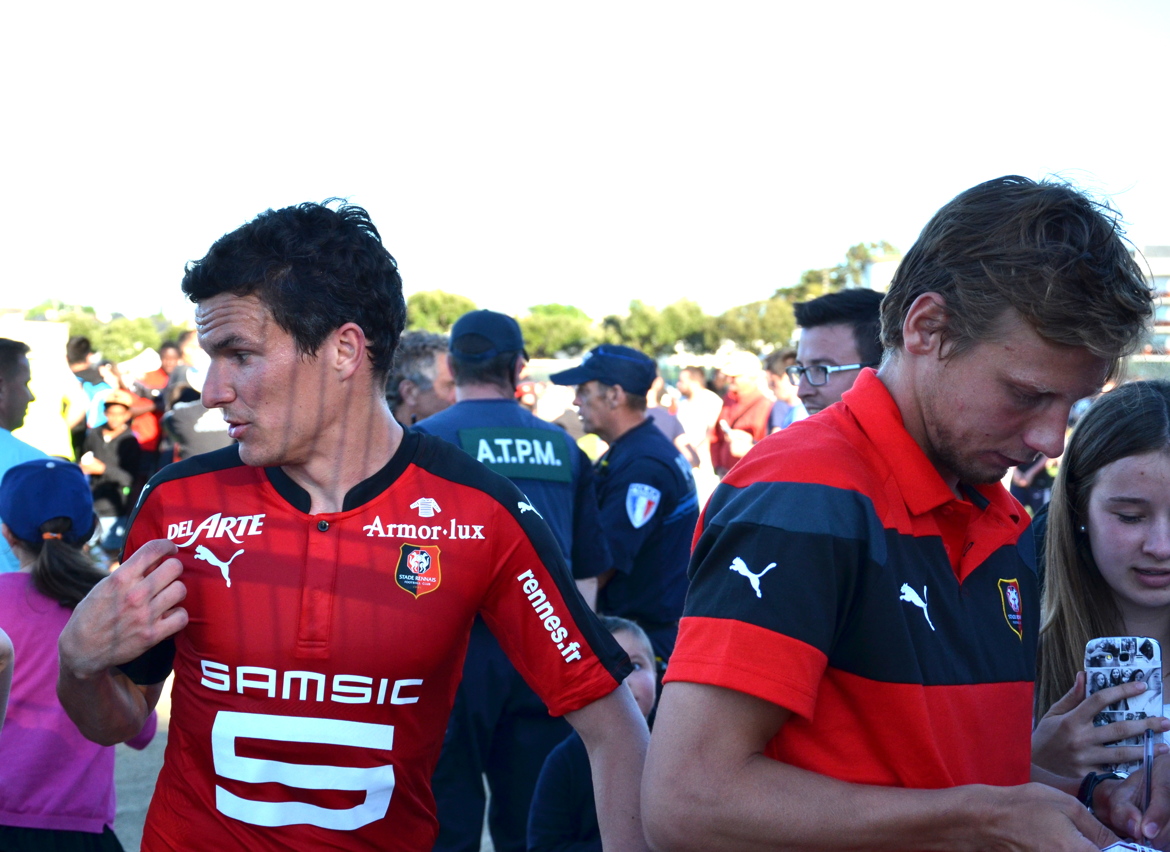 Photographie prise lors du match opposant le Stade rennais à l'USM Alger en match amical au stade Paul-Audrin de Dinard le 16 juillet 2016. Ici, Romain Danzé et Clément Chantôme.